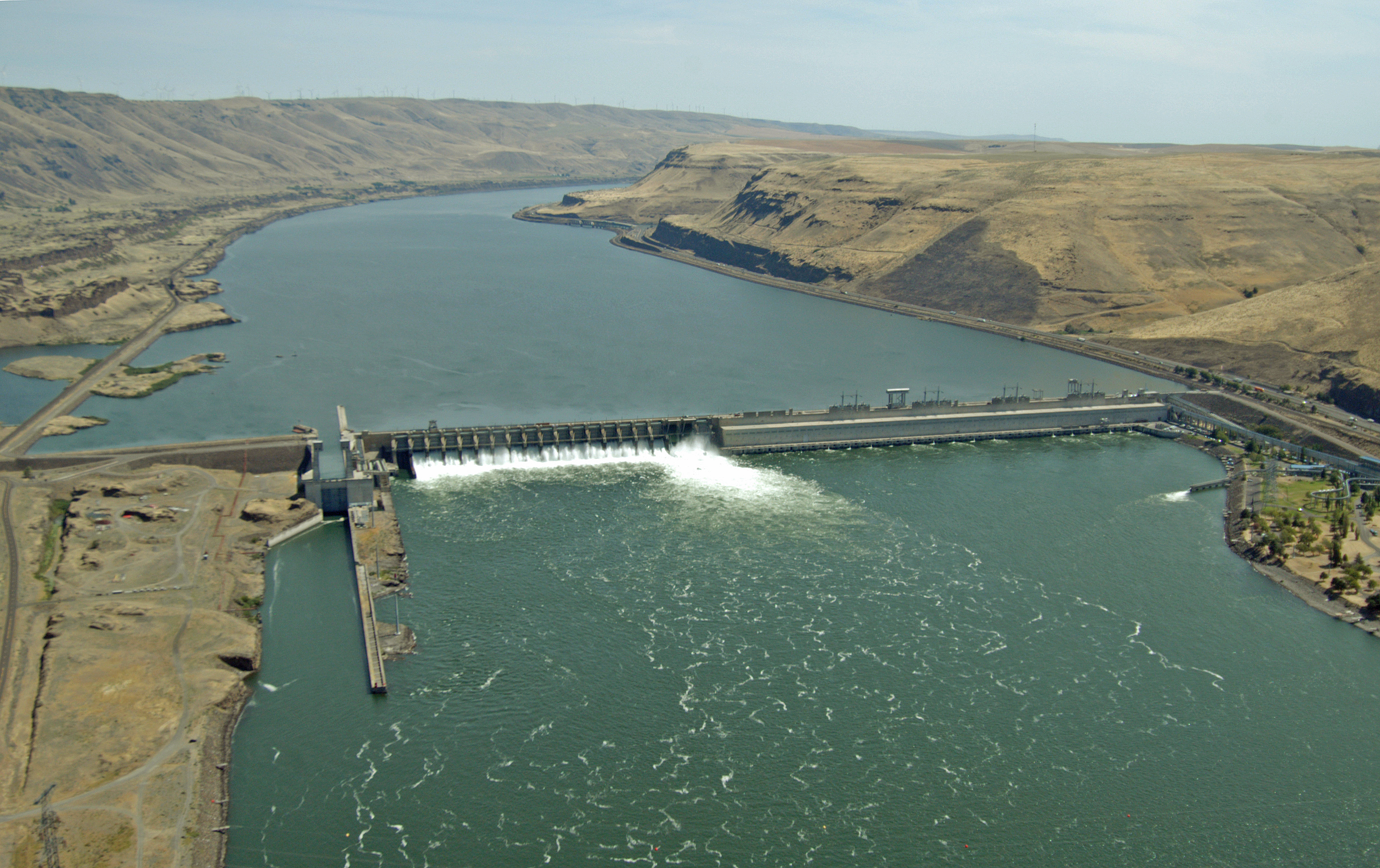 John Day Dam 2